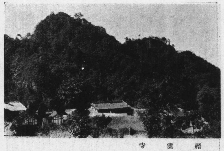 鄭璧成著四川導遊插圖